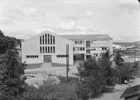 Rieber & Co skofabrikk i Tvetenveien 55, Oslo 1957.